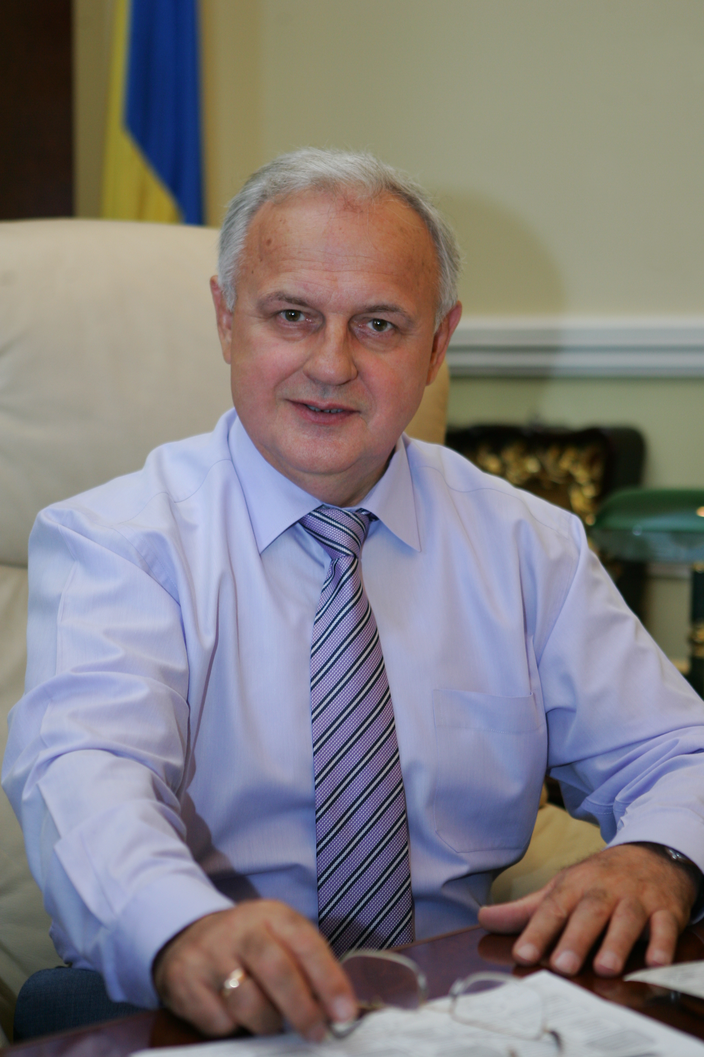 Фото Близнюка А.М.